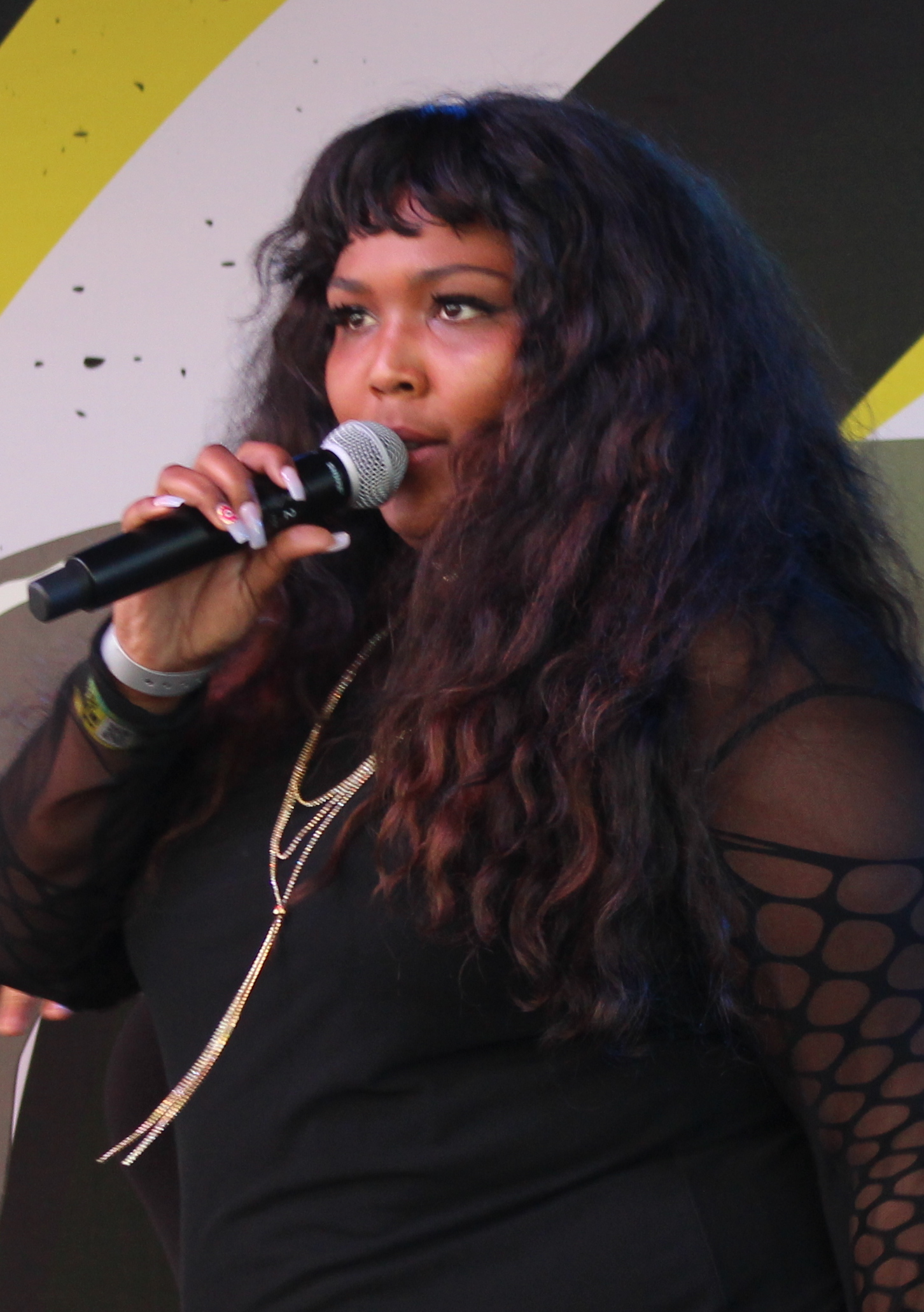 lizzo